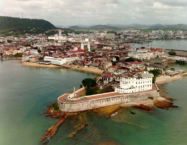 Panama-Stadt im Januar 1990 ? Im Vordergrund der Oberste Gerichtshof (weißes Gebäude) und die Kirche Franz von Assisi.